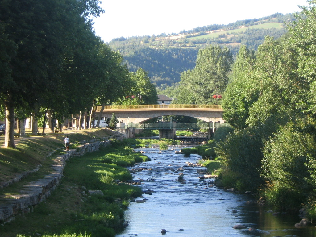 La Colagne à Marvejols (48)